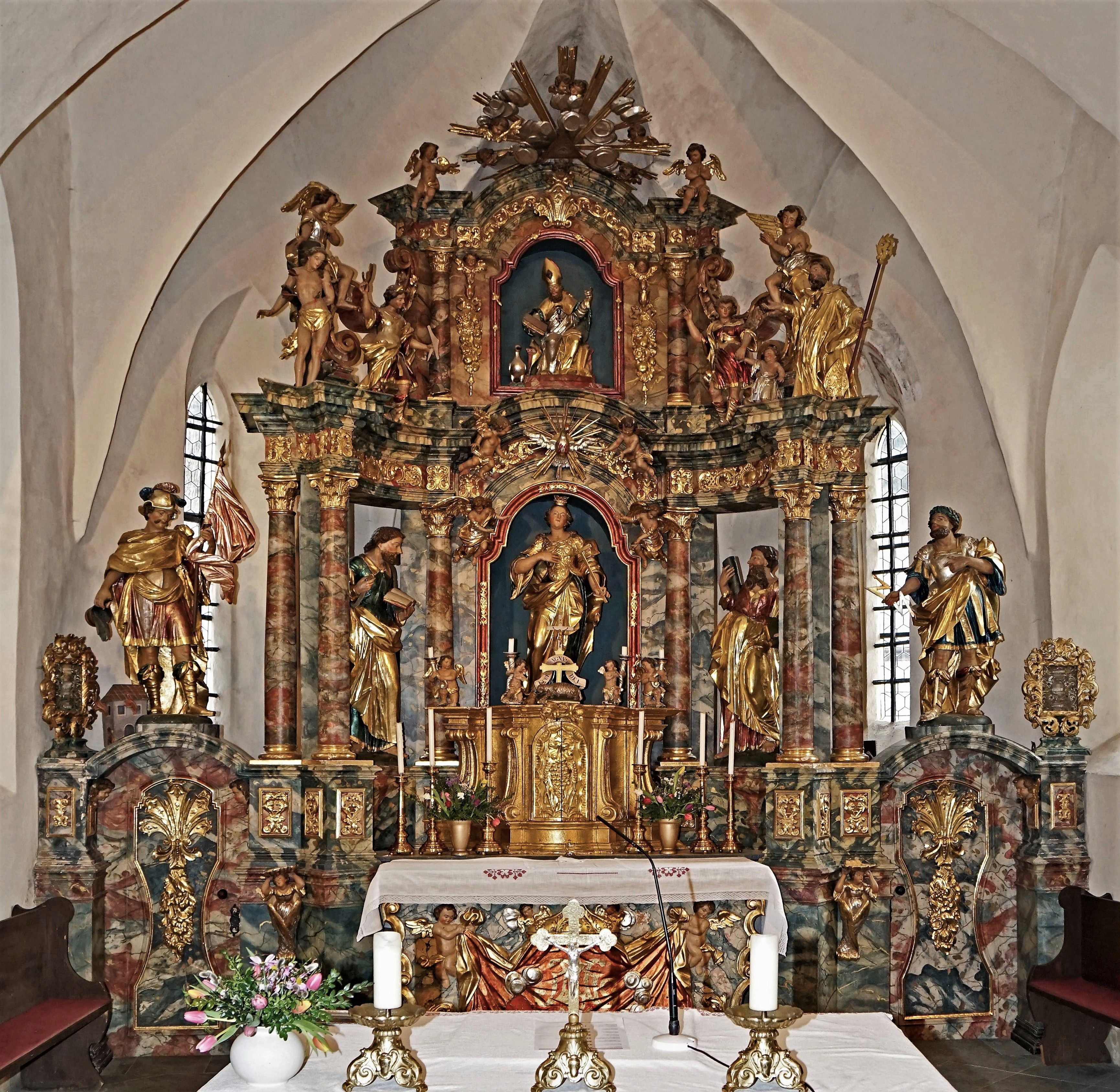 Kath. Pfarrkirche St. Margareta (Glödnitz), barocker Hochaltar